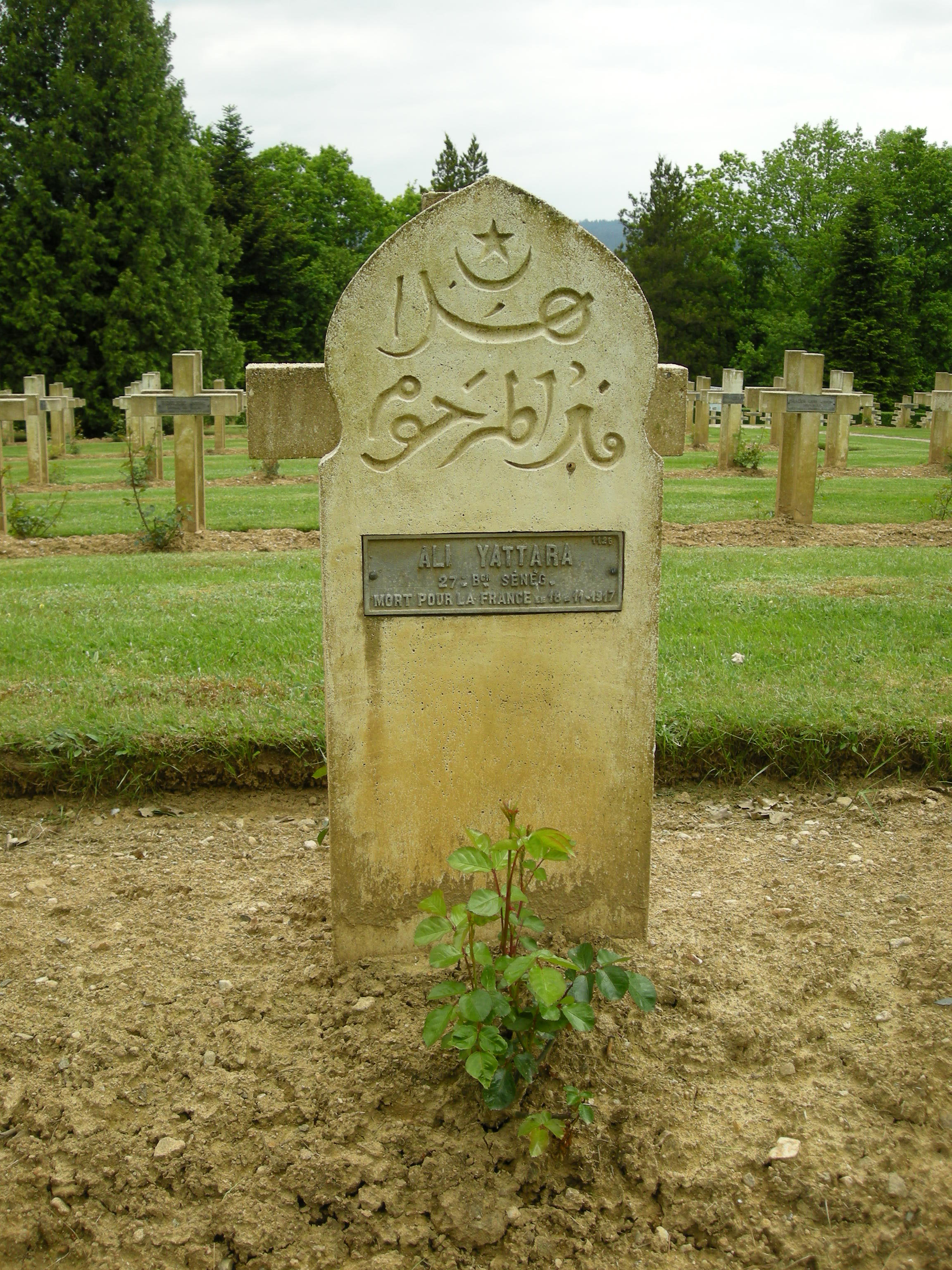 Tombe d'Ali Yattara, du 27e Bataillon de Tirailleurs Sénégalais, mort pour la France le 18 novembre 1917 (Nécropole nationale de Saulcy-sur-Meurthe, Vosges) - Soldat 2e classe au 27e Bataillon Sénégalais - né en 1893 à Doumbouya (Guinée) - décédé le 18/11/1917 à Gérardmer (88) - voir sa fiche sur Gen Web [1]